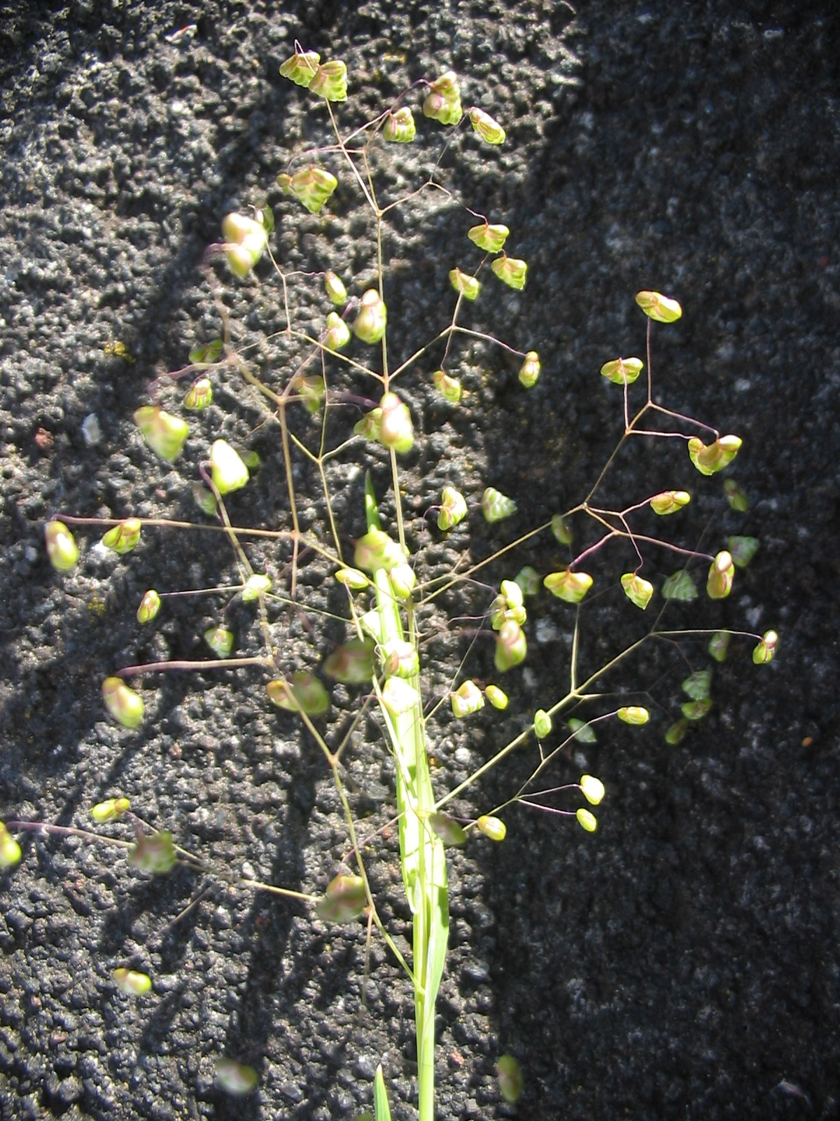 Kleines Zittergras (Briza minor) - Flowers